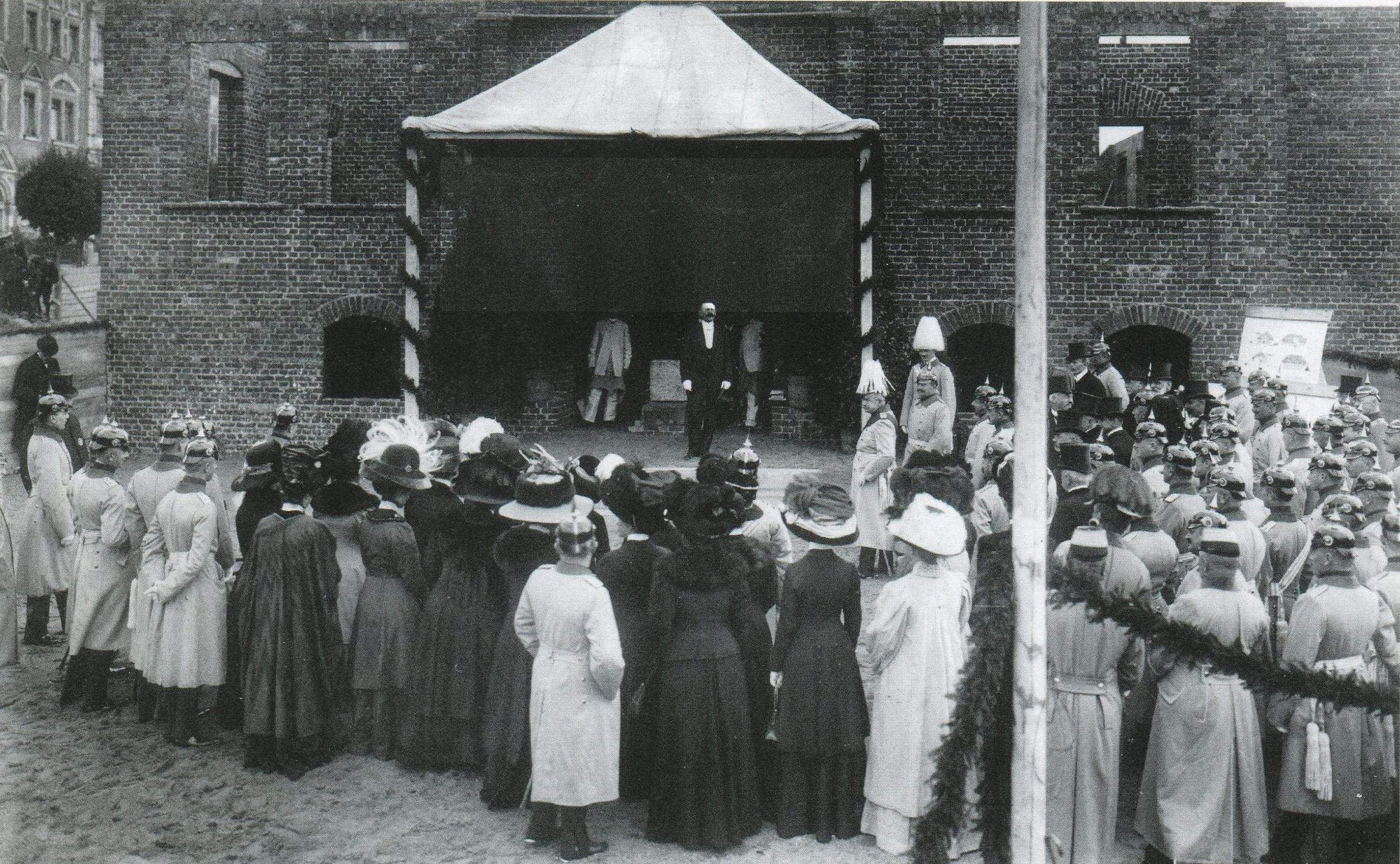 Rede von Oberbürgermeister Georg Snay zur verspäteten Grundsteinlegung für das bereits im Rohbau befindliche Regimentshaus am Friedrichsplatz in Görlitz (heute Zgorzelec)